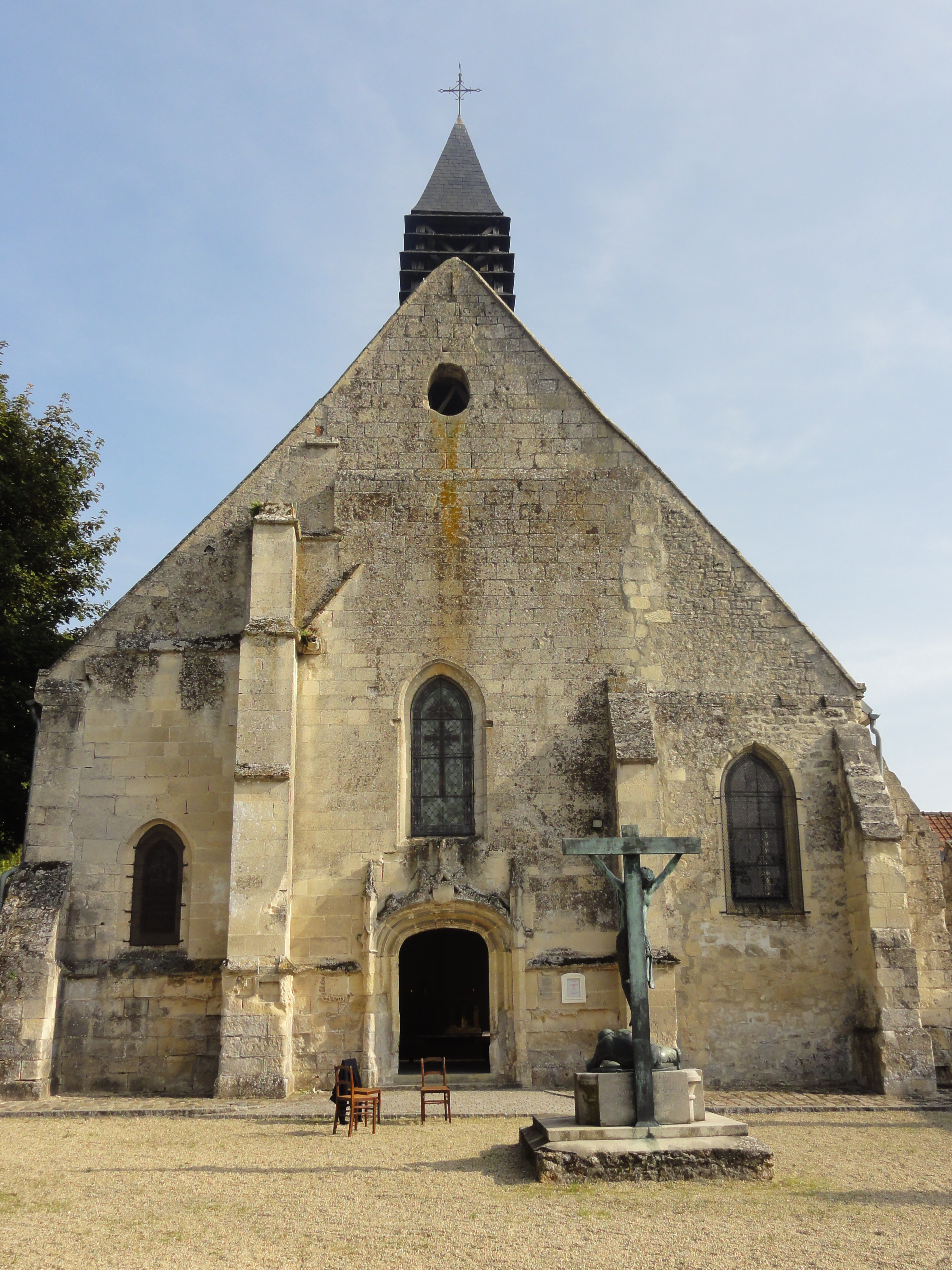 Église Saint-Martin de Bouillant - voir titre.